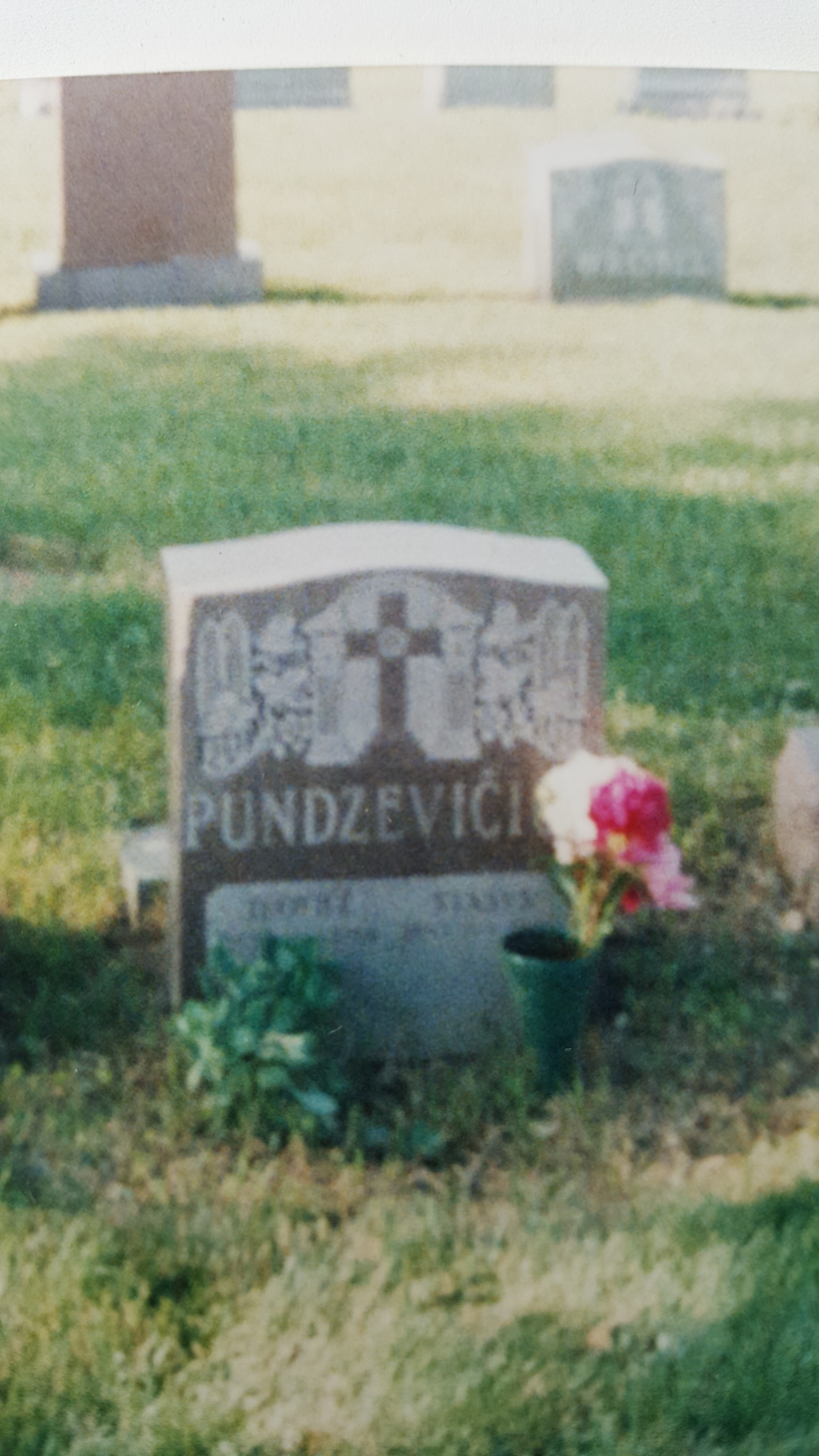 Kapas